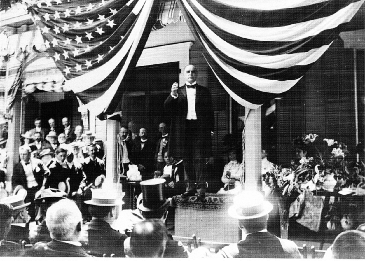 William McKinley en campagne Contents 1 Summary 2 Source 3 Licensing 4 Licensing 5 Original upload log Summary William McKinley en campagne, 1896 McKinley campaign speech. William McKinley making a campaign speech from his home in Canton, Ohio in 1896. Credit: National Museum of American History. Source Images of American Political History Licensing "[...] All images are strongly believed to be in the public domain. They were obtained from non-copyrighted U.S. government holdings and publications and from published works with clearly expired copyrights. Thus there are absolutely no restrictions on their use. [...]"